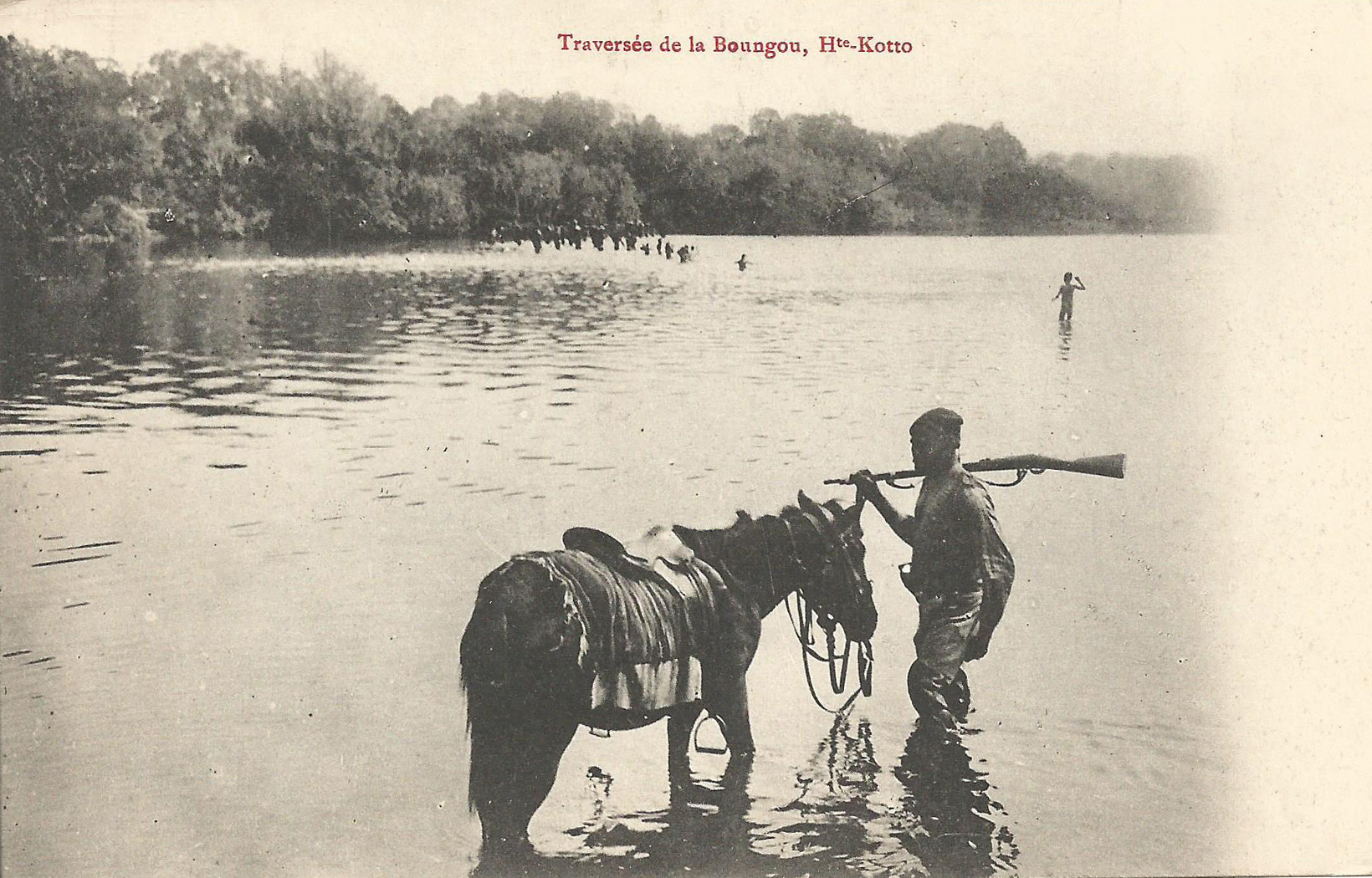 Traversée de la Boungou [affluent de rive droite de la Kotto], Hte-Kotto. Carte postale ancienne, sans indication d'auteur, d'éditeur ou de date. Collection particulière